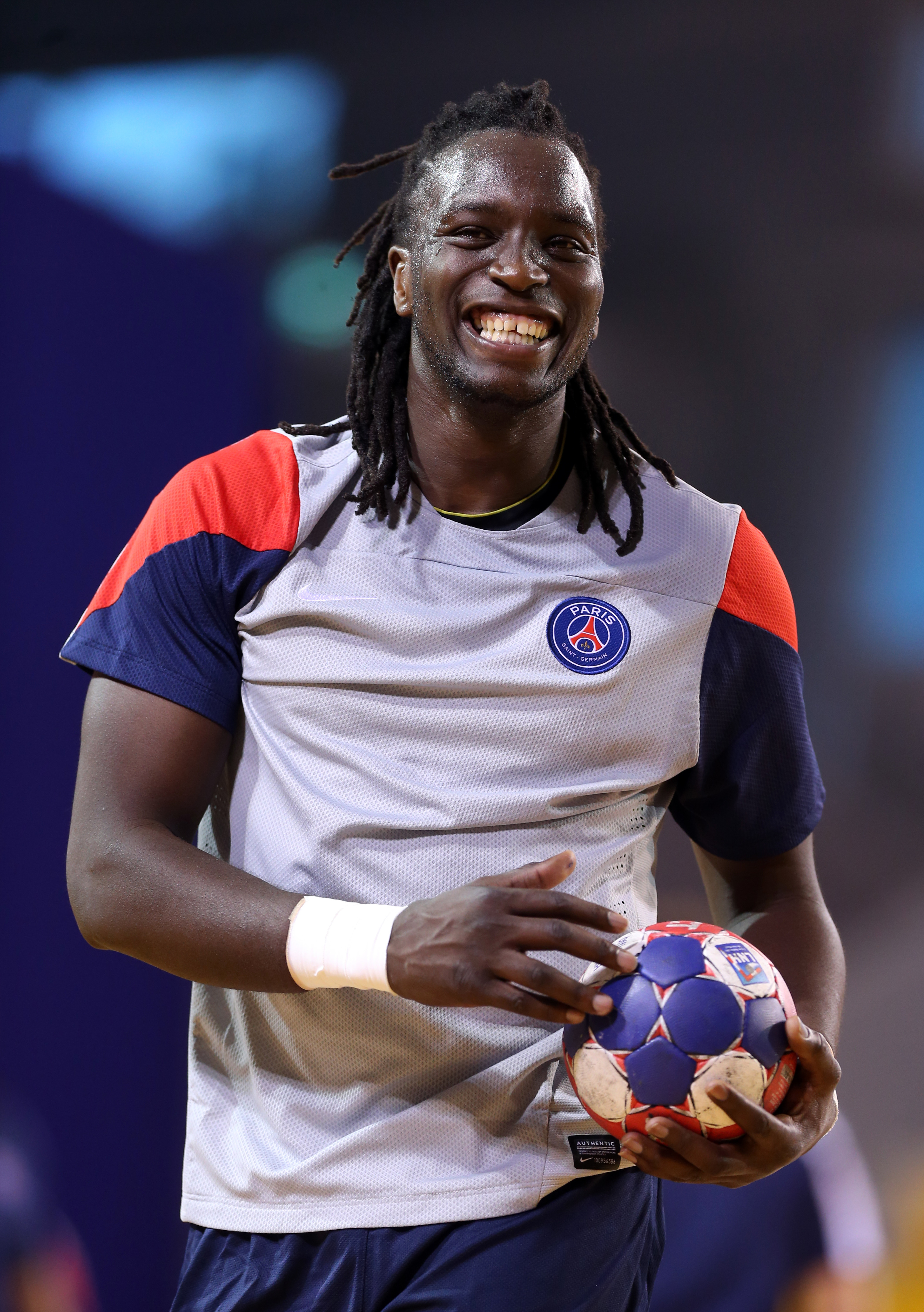 Ibrahima Diaw lors d'un entrainement du PSG Handball lors d'un stage à l'Academy ASPIRE à Doha au Qatar le 03 août 2013